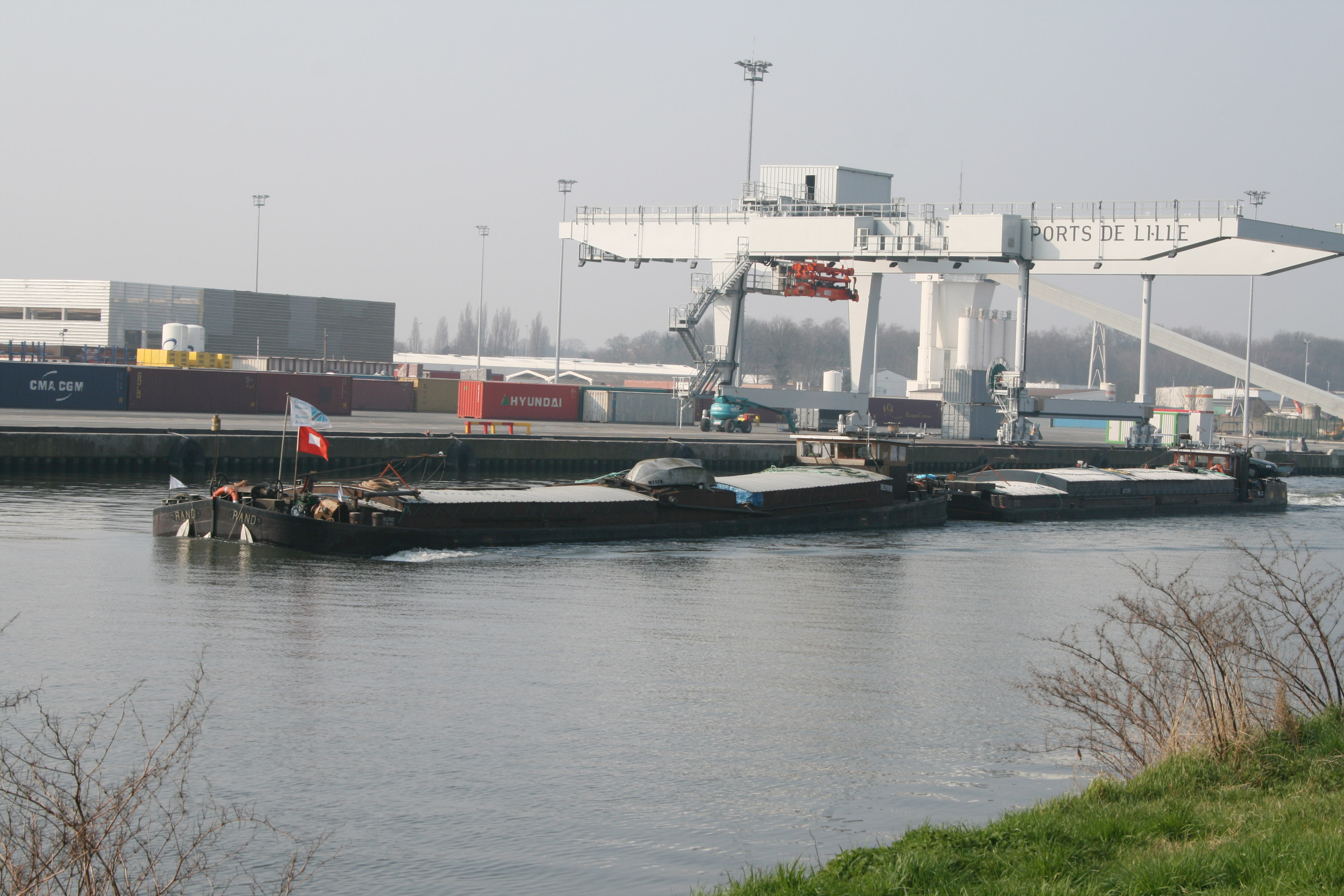 Train de peniches au port fluvial de Lille